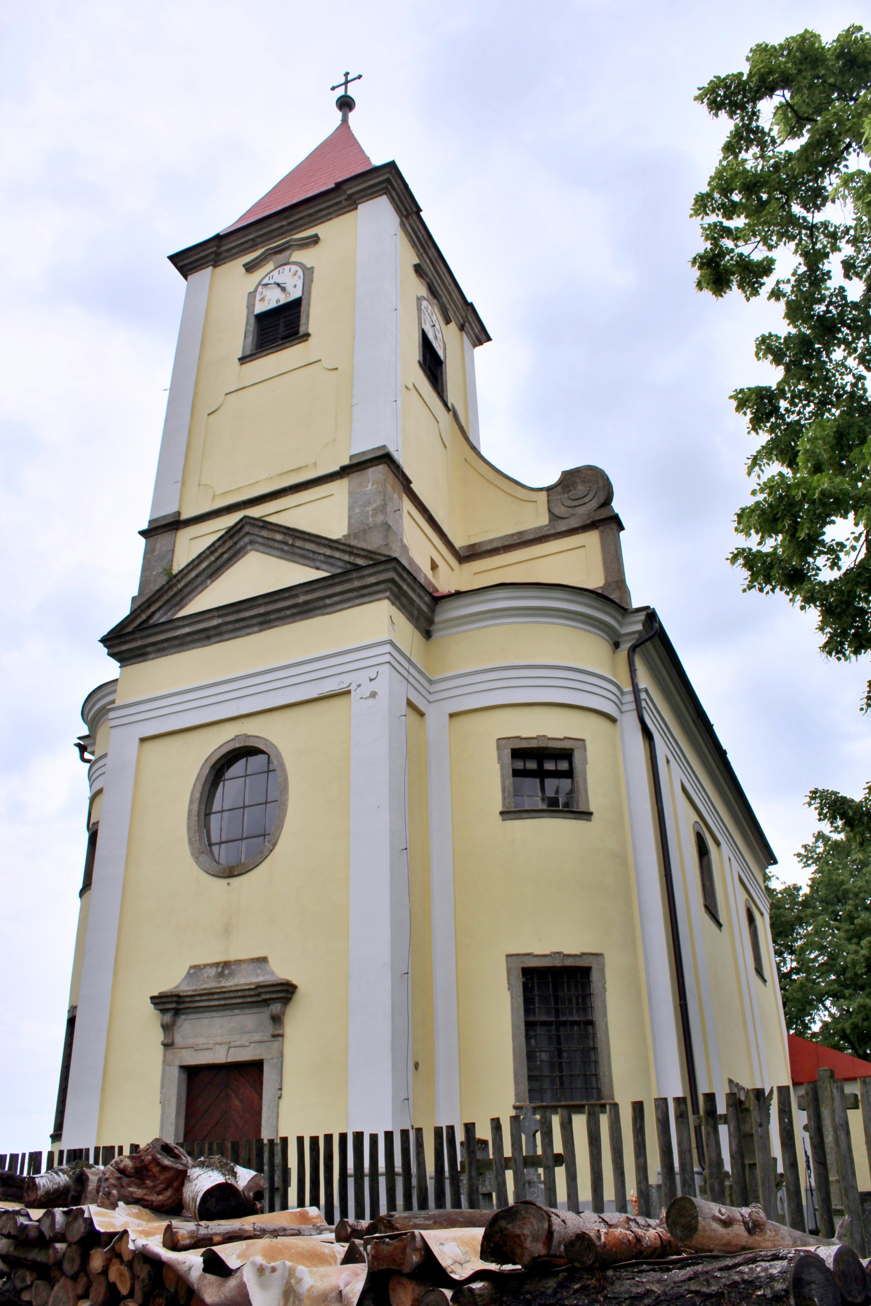 Kostel svatých Oldřicha Augsburského a Linharta